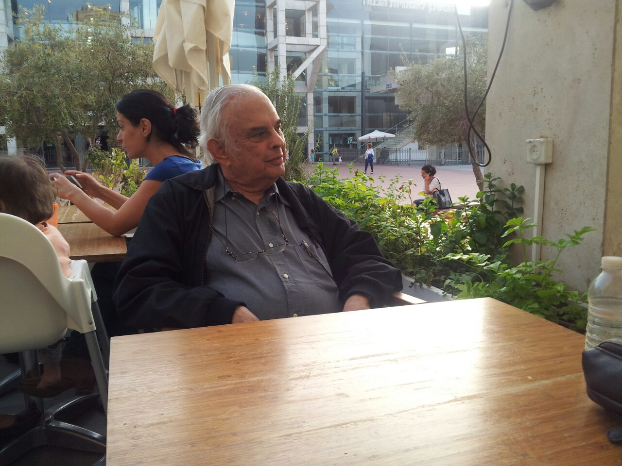 אליקים ירון ברחבת המשכן לאמנויות הבמה